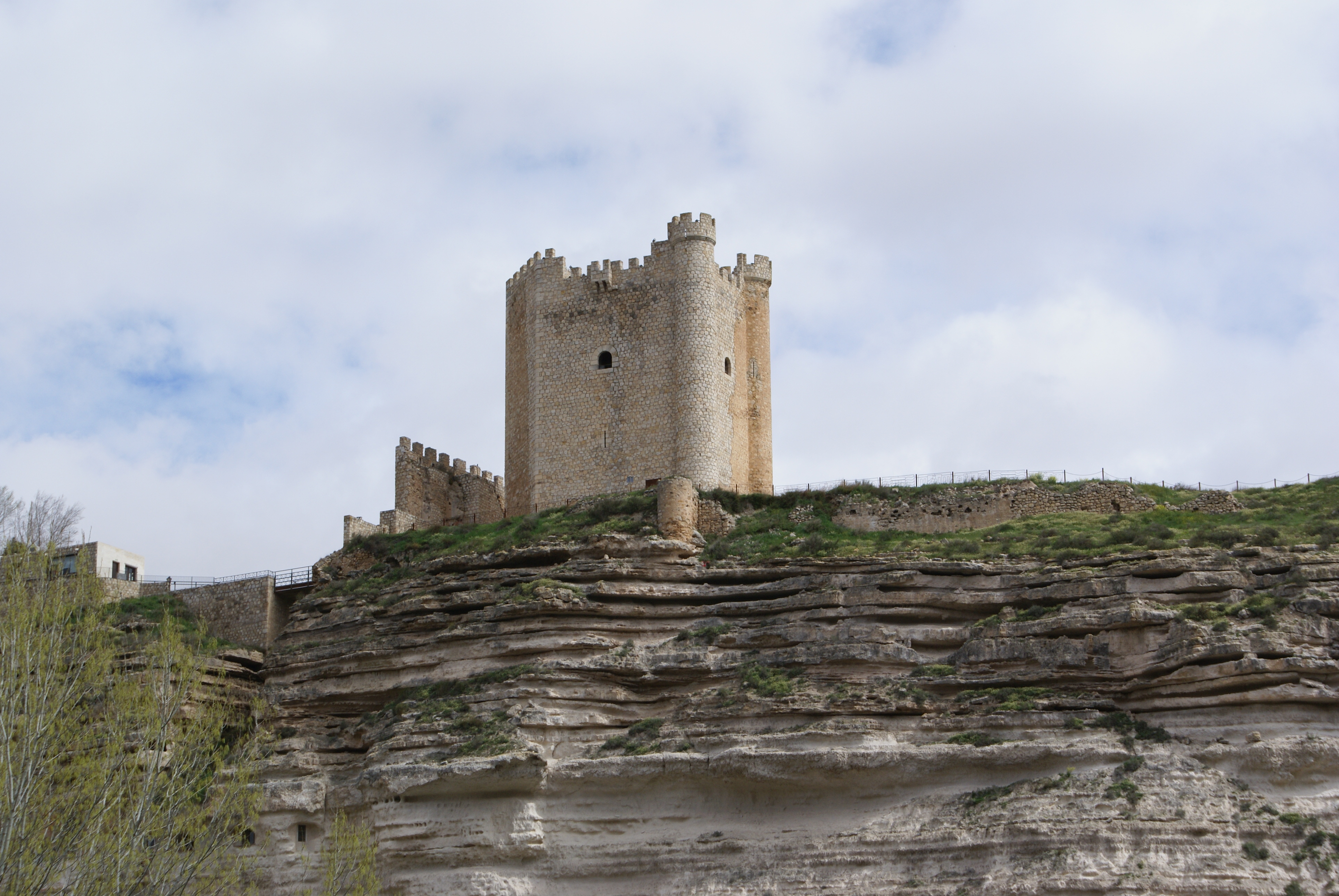 Alcalá del Júcar- Albacete (Spain)